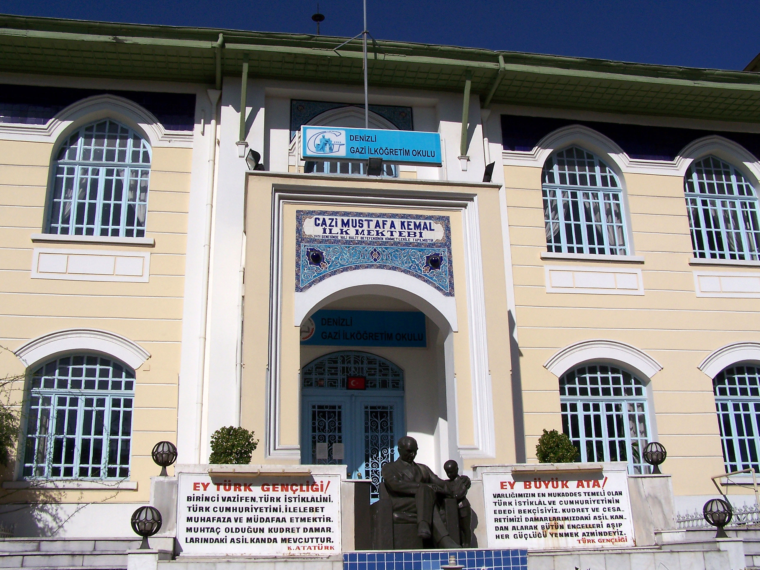 Denizli Gazi İlköğretim Okulu in Denizli, Turkey